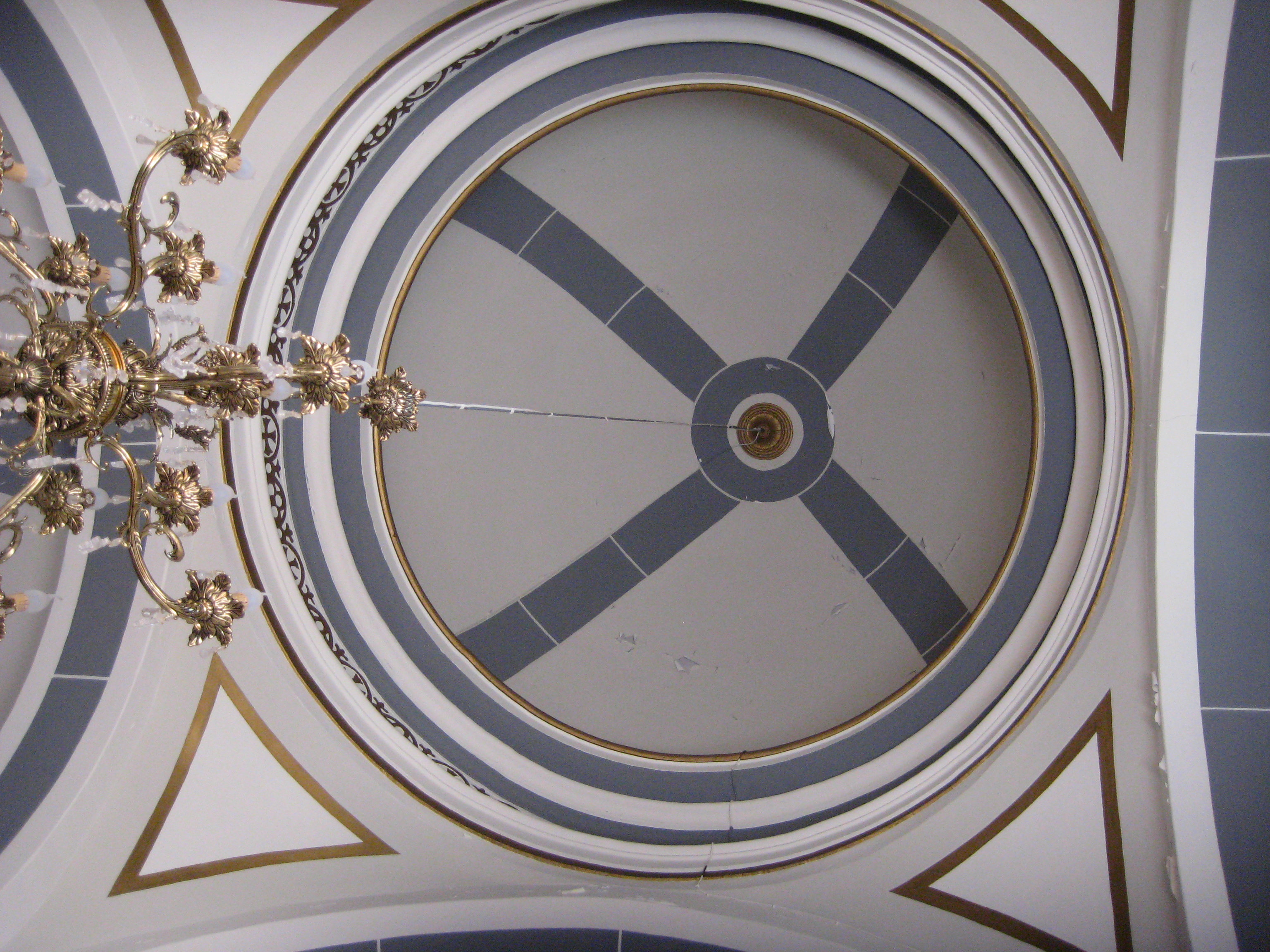 Cúpula de l'ermita del Calvari de Torreblanca (Plana Alta)